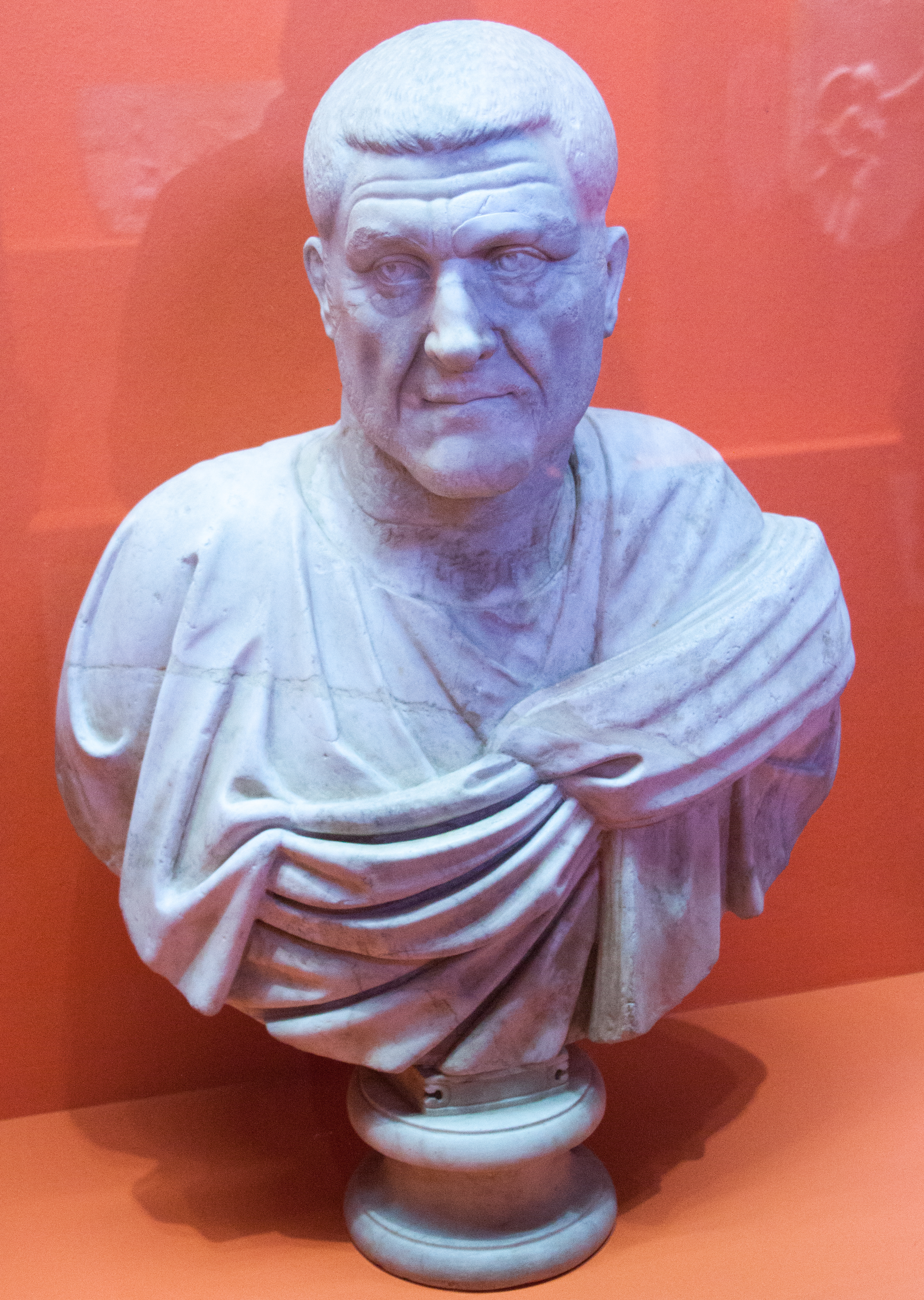 Roma, ritratto di Massimino Trace, prov. Collezione Albani. Musei Capitolini, inv. S473. In mostra al Colosseo nel 2013